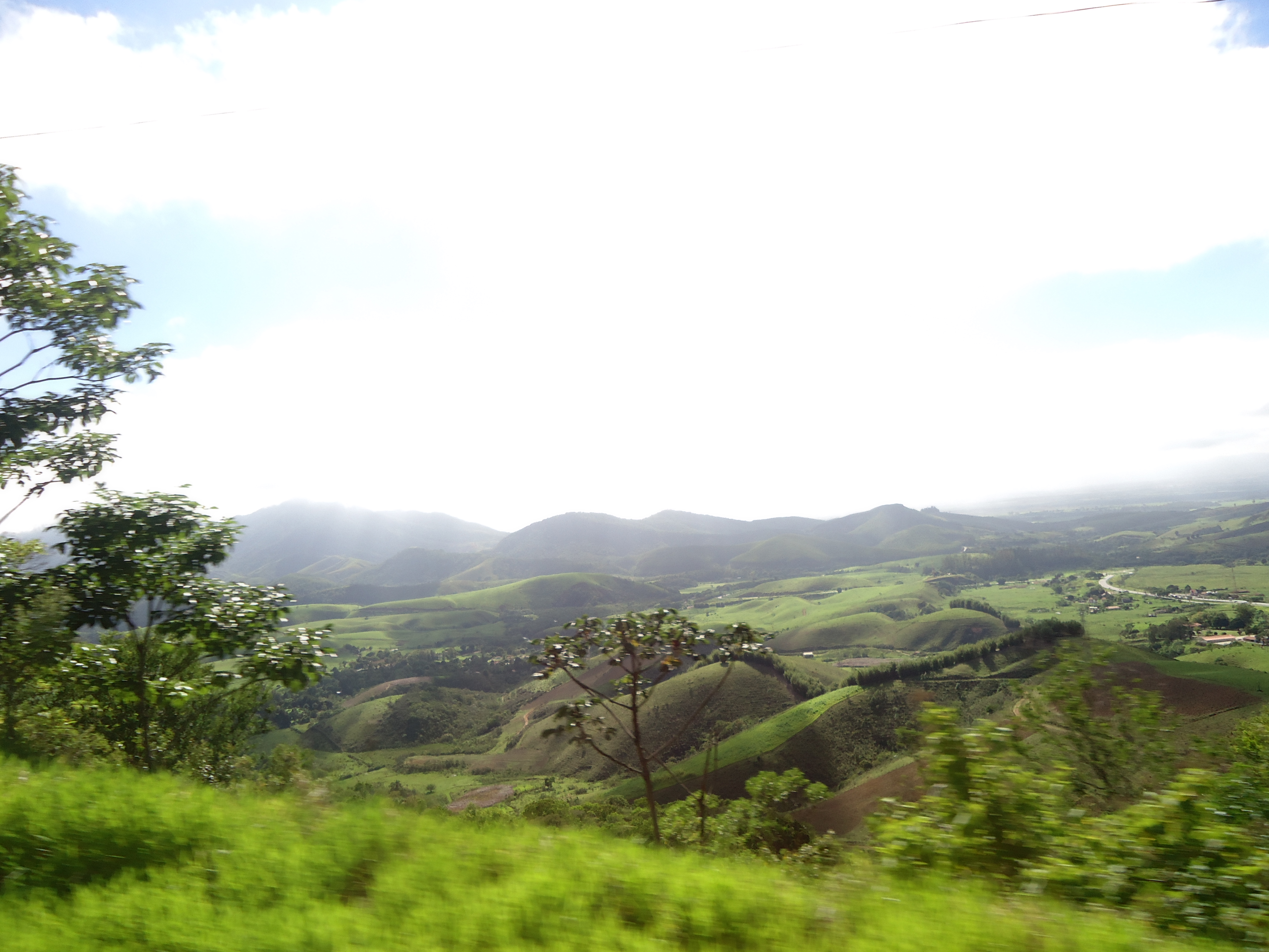 Palmácia-CE